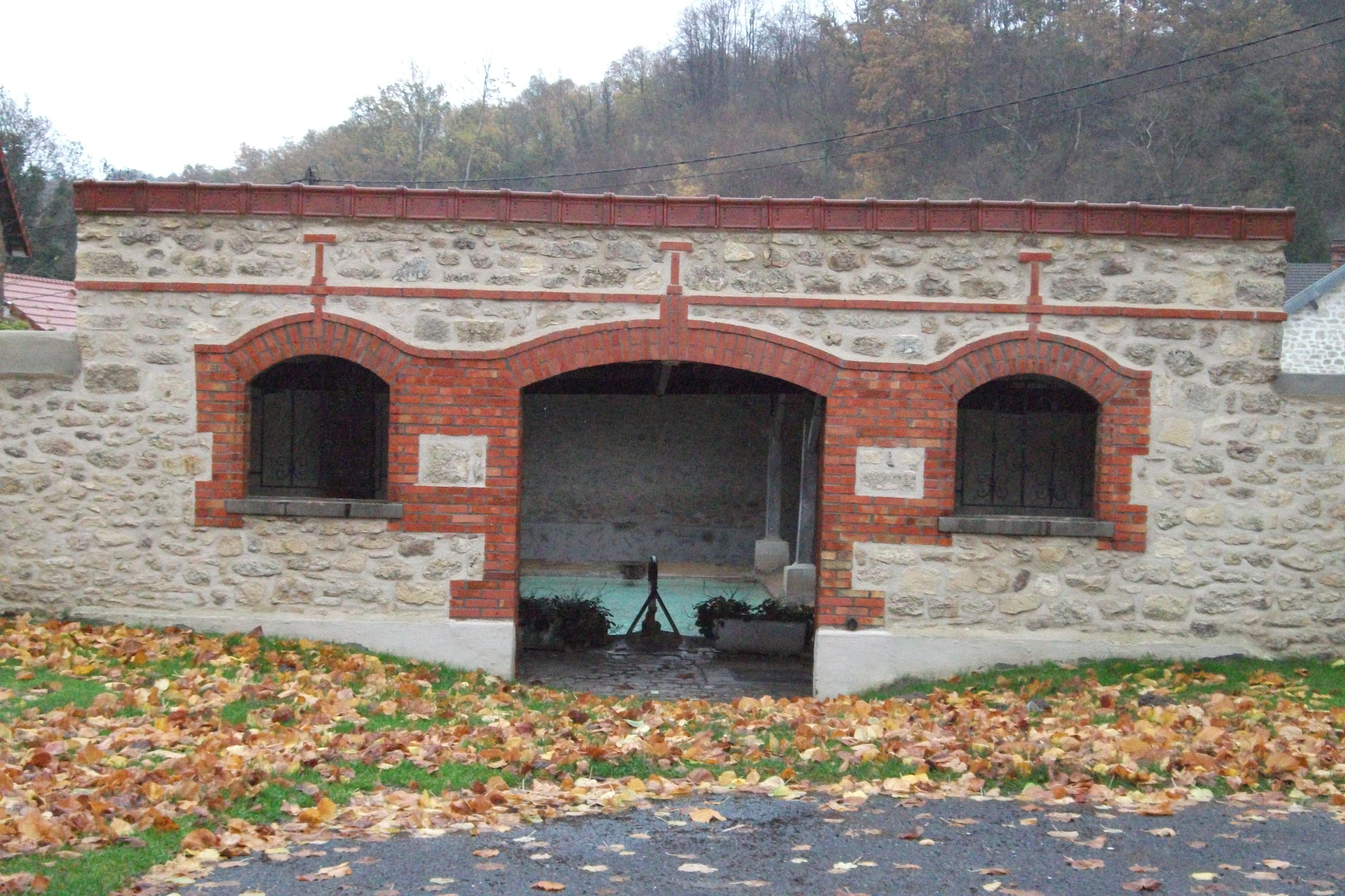 le lavoir d'Hourges_